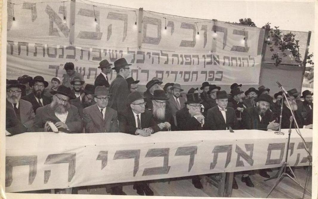 הנחת אבן הפינה לישיבת כנסת חזקיהו